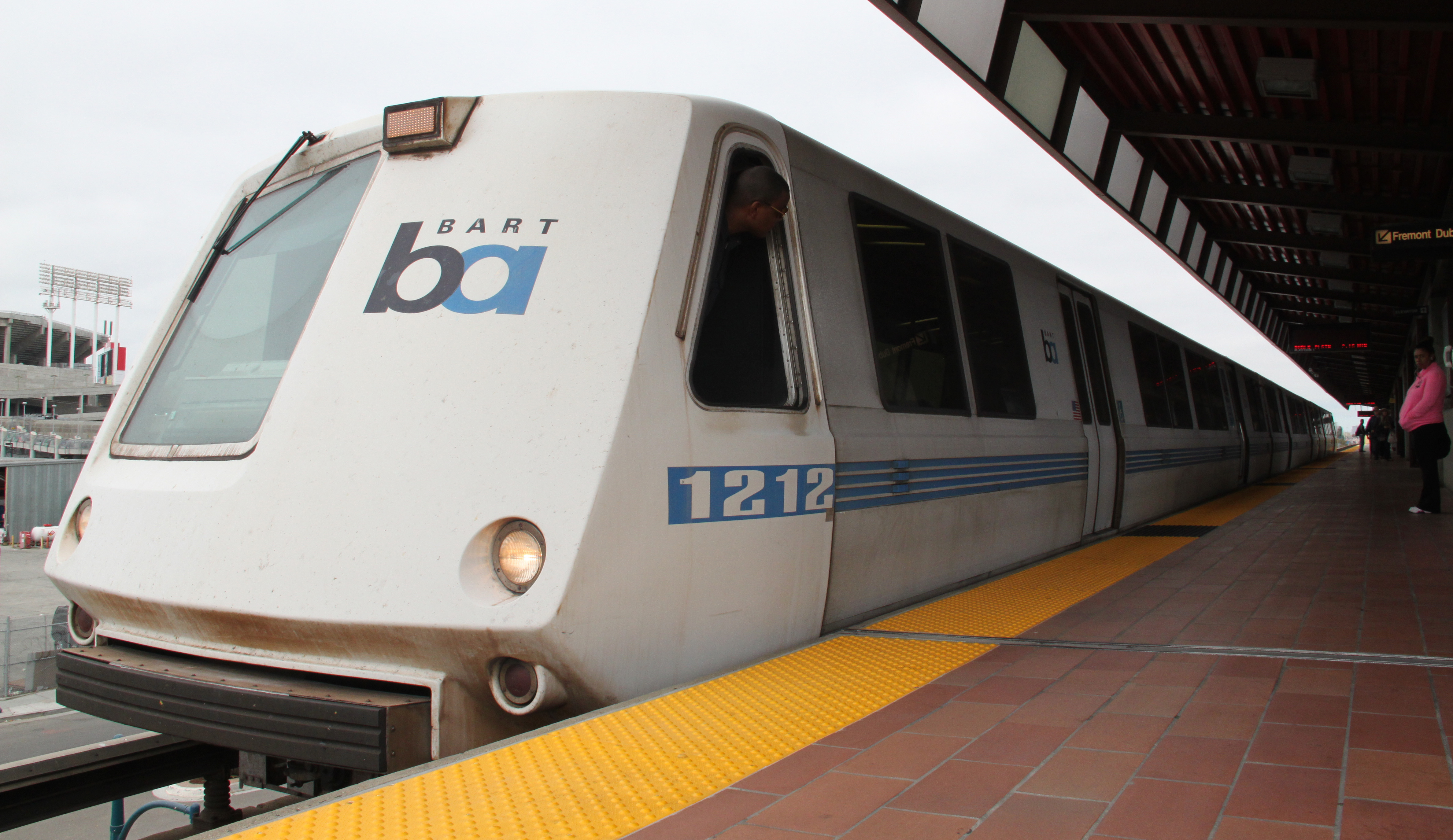 A Bart A car at the Oakland Coliseum Station.